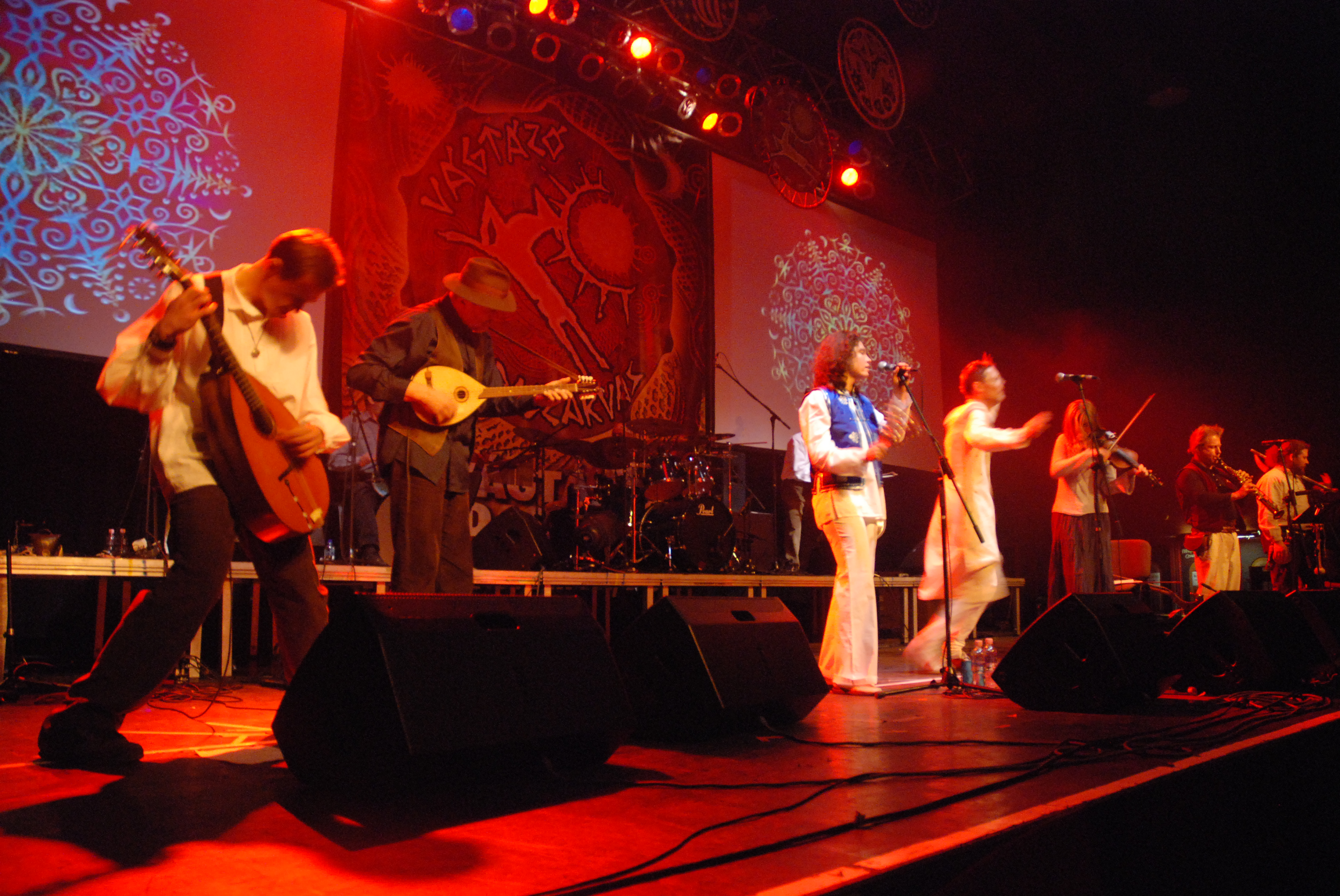 Jelenet a Vágtázó Csodaszarvas koncertjén. Balról jobbra: Fábri András, Fábri Géza, Gebri Bernadett, Grandpierre Attila, Molnár Kriszta, Vaskó Zsolt és Bese Botond. Budapest, Petőfi Csarnok.